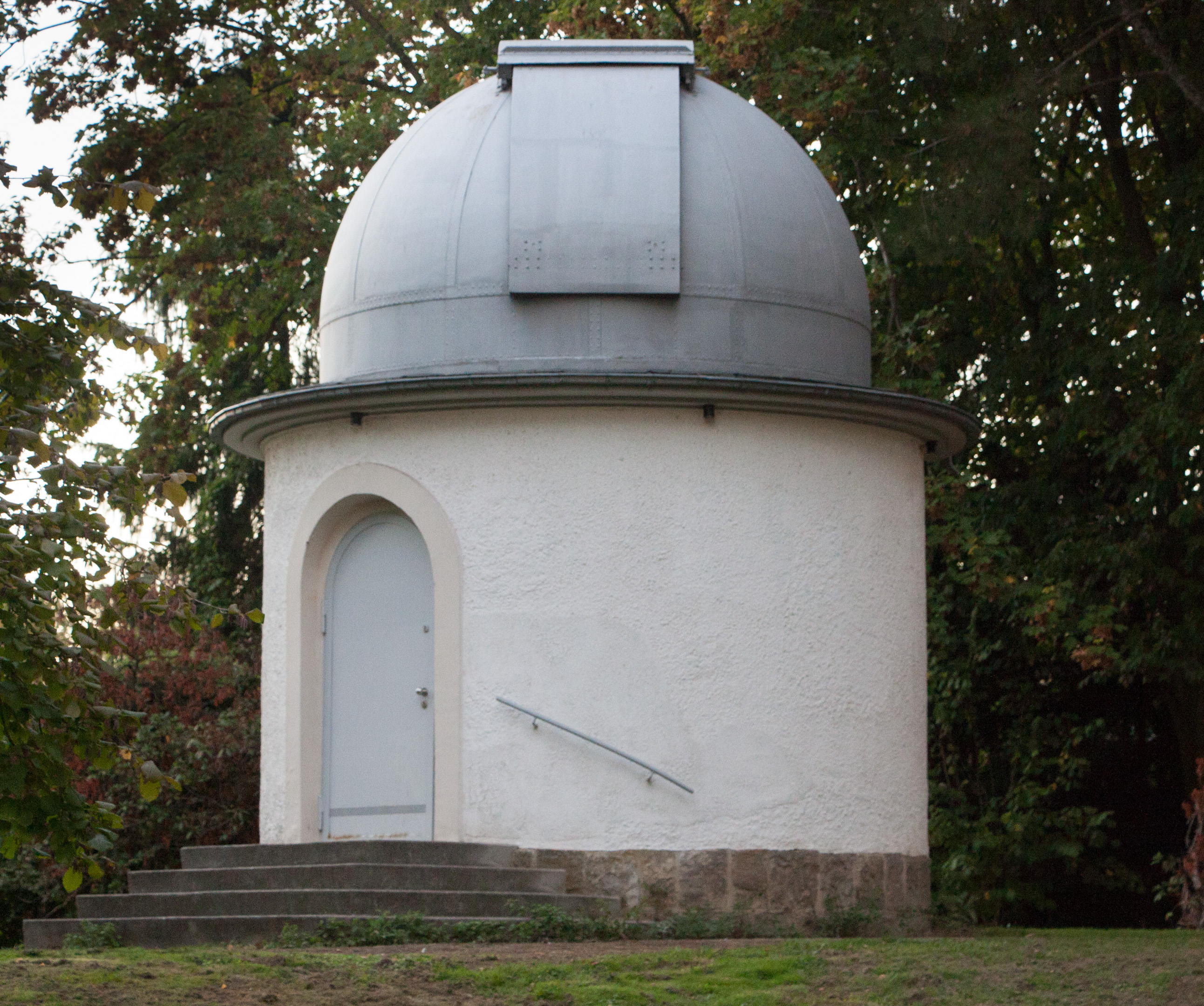 Recklinghausen Monument 179 Volkssternwarte, Seitenkuppel, sog. UraniatempelThis is a photograph of an architectural monument., no. 179